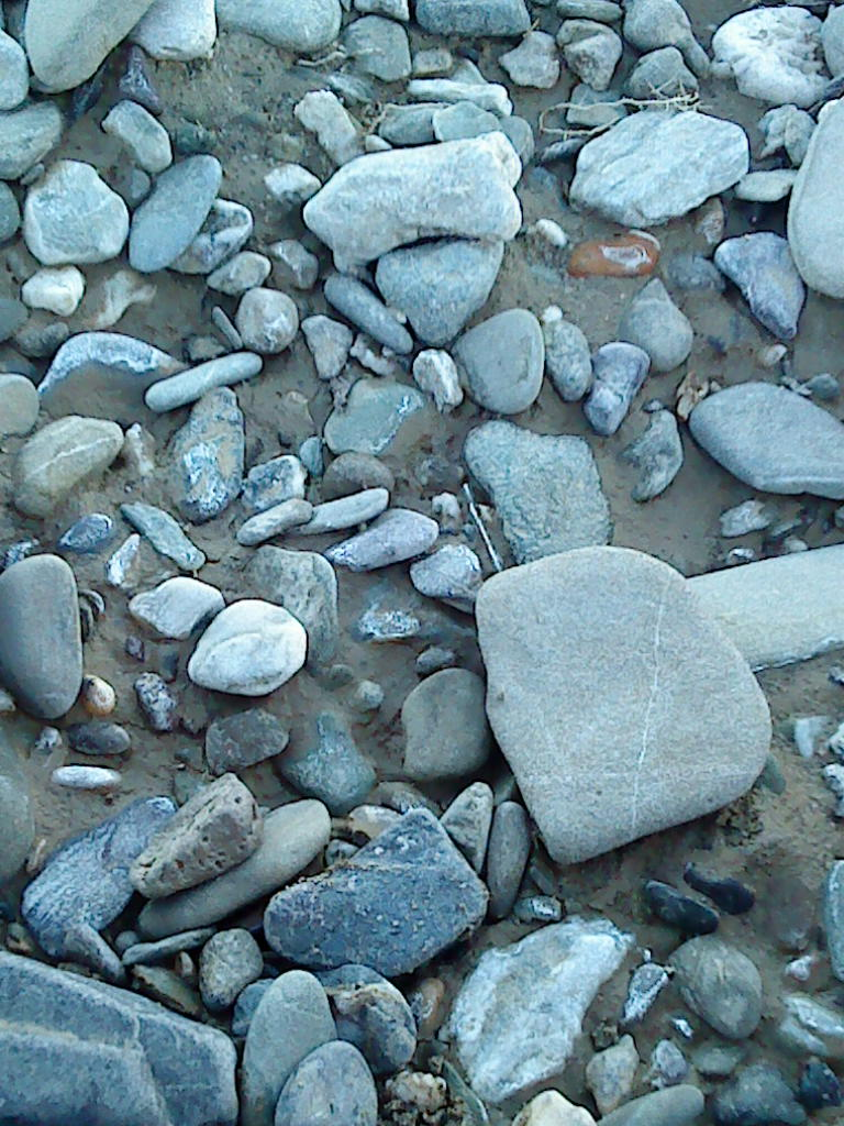 رودخانه کوبچ با سنگهای زیبا